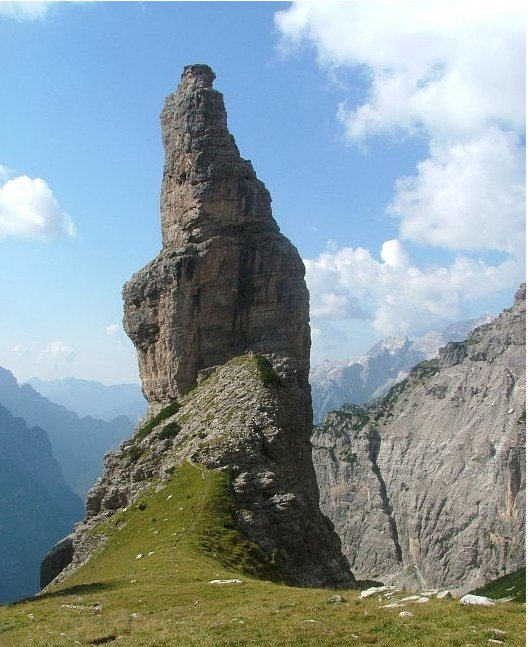 Campanile di Val Montanaja